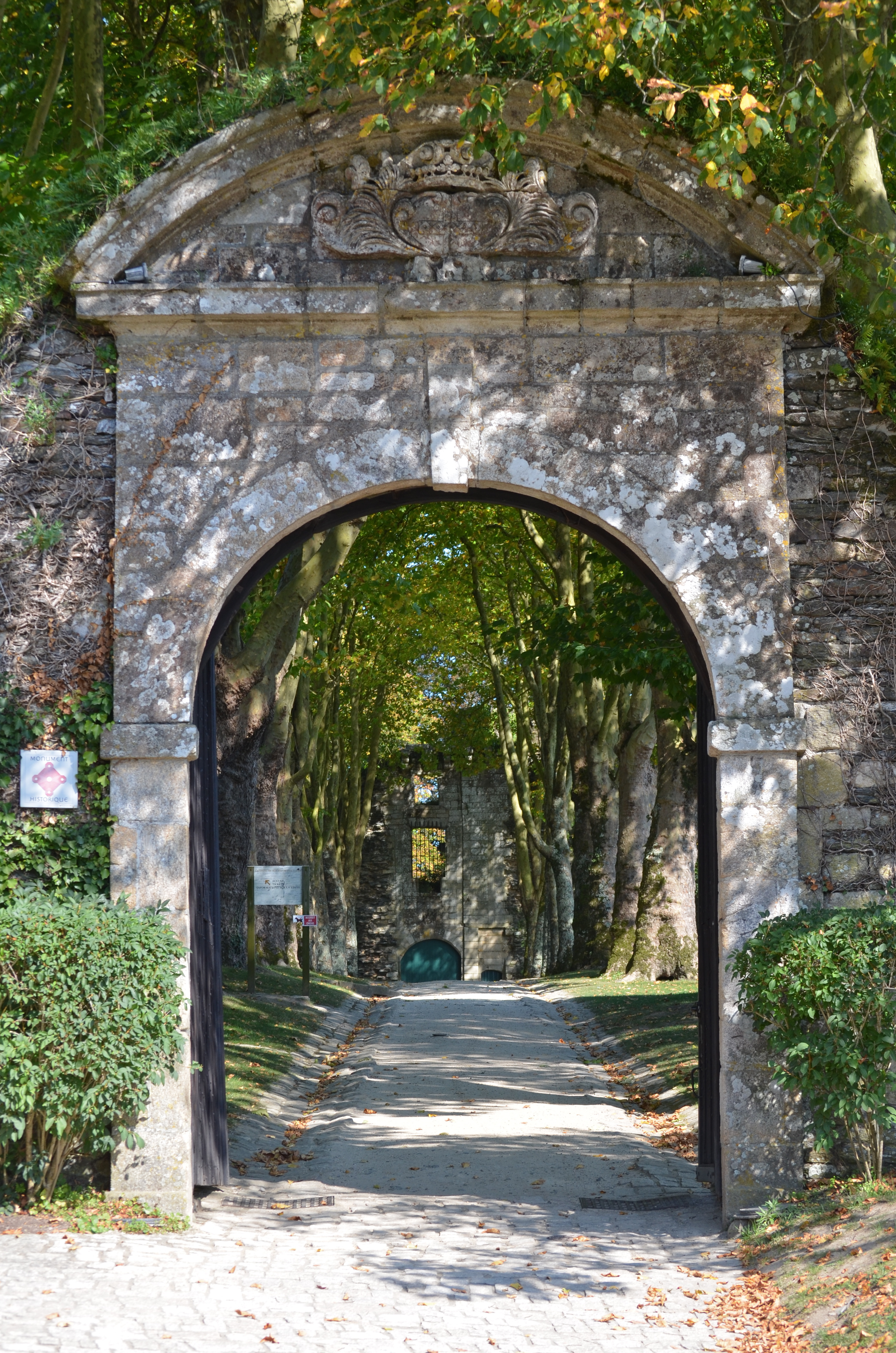 Château de Rochefort-en-Terre (Morbihan) .